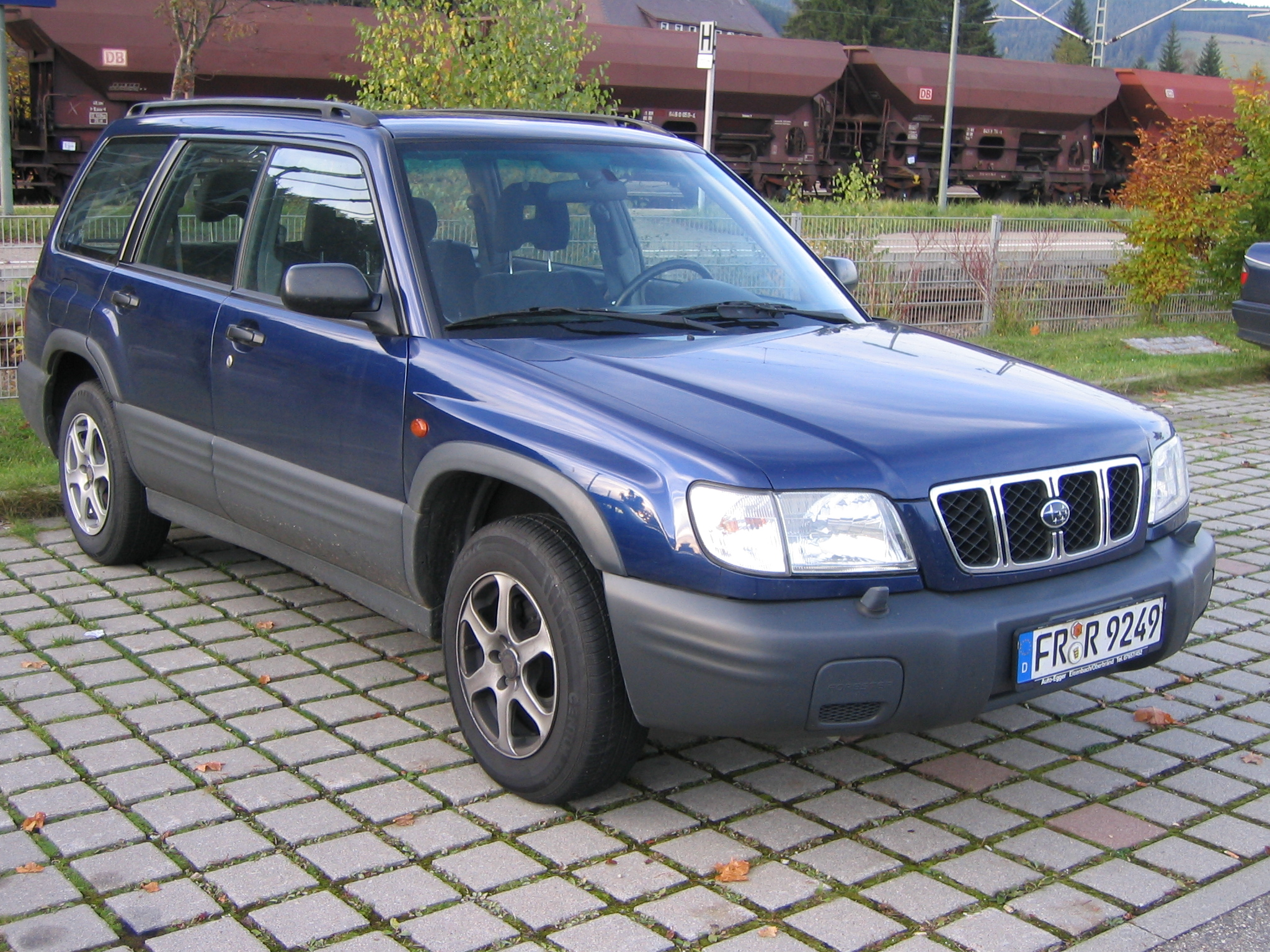 Subaru Forrester